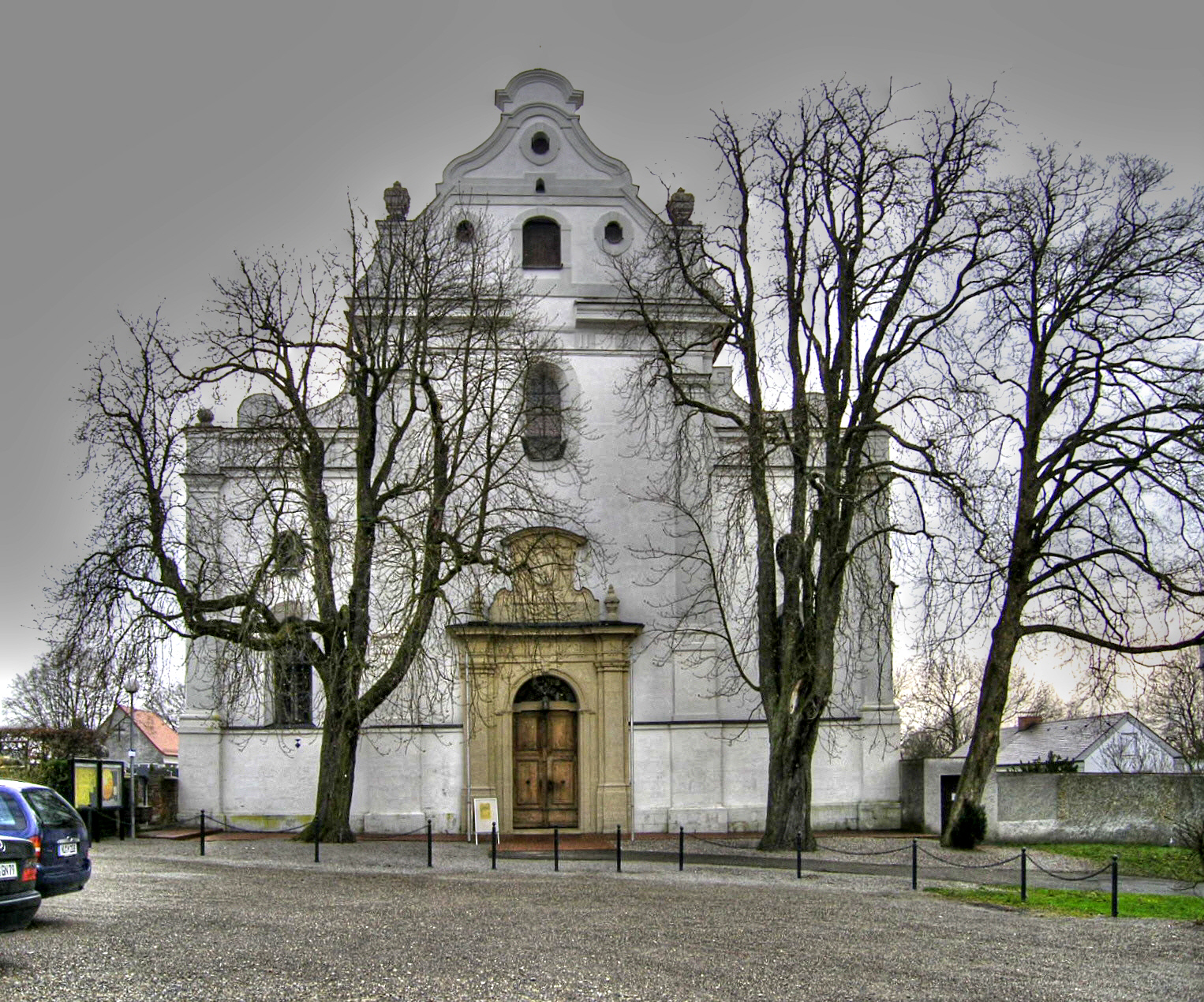 Klosterkirche Oberelchingen Date: 2006-04-18